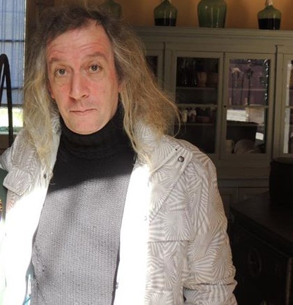 Diego Capusotto en el año 2012, en Entre Rios.